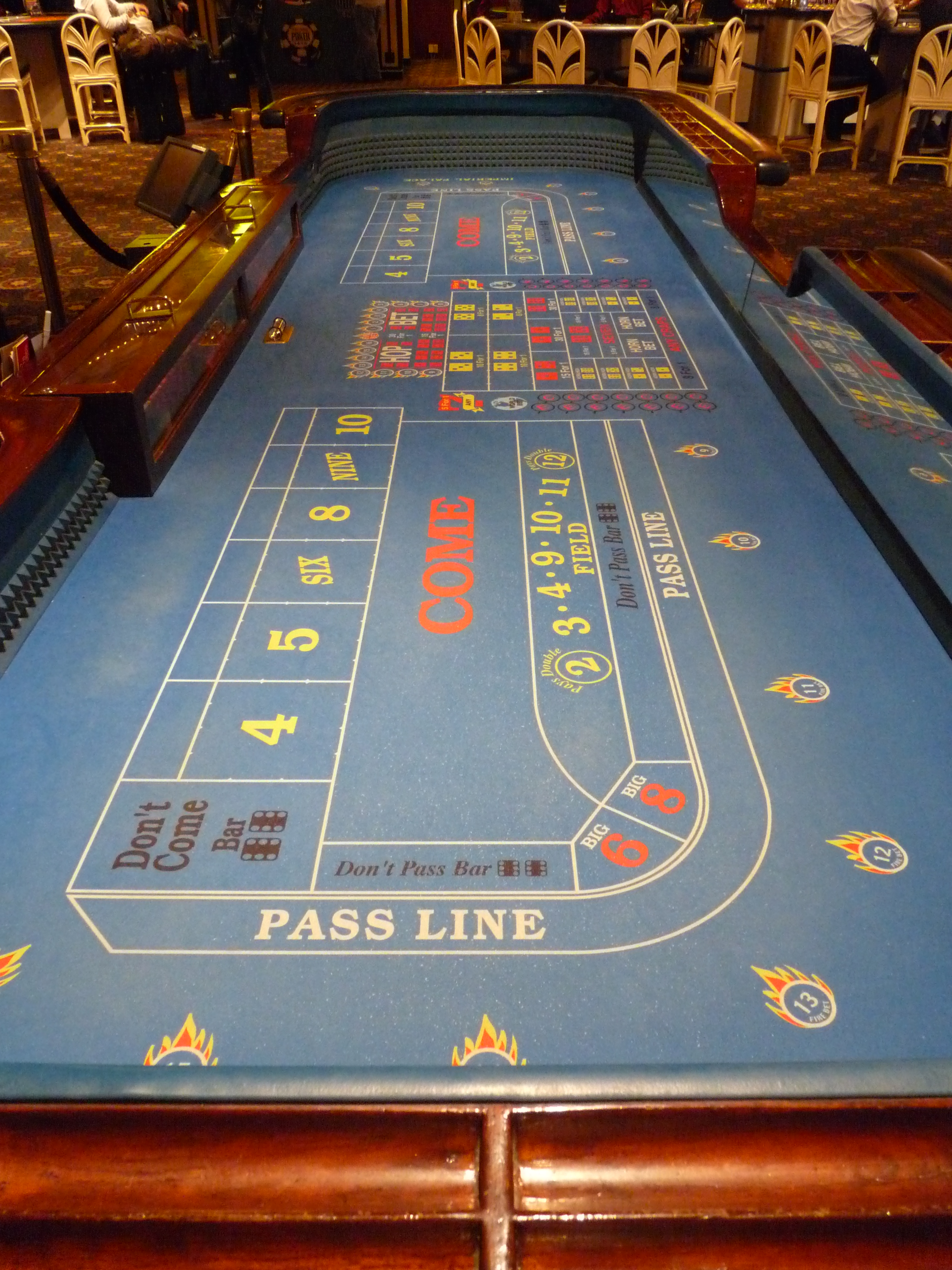 Imperial Palace, Las Vegas